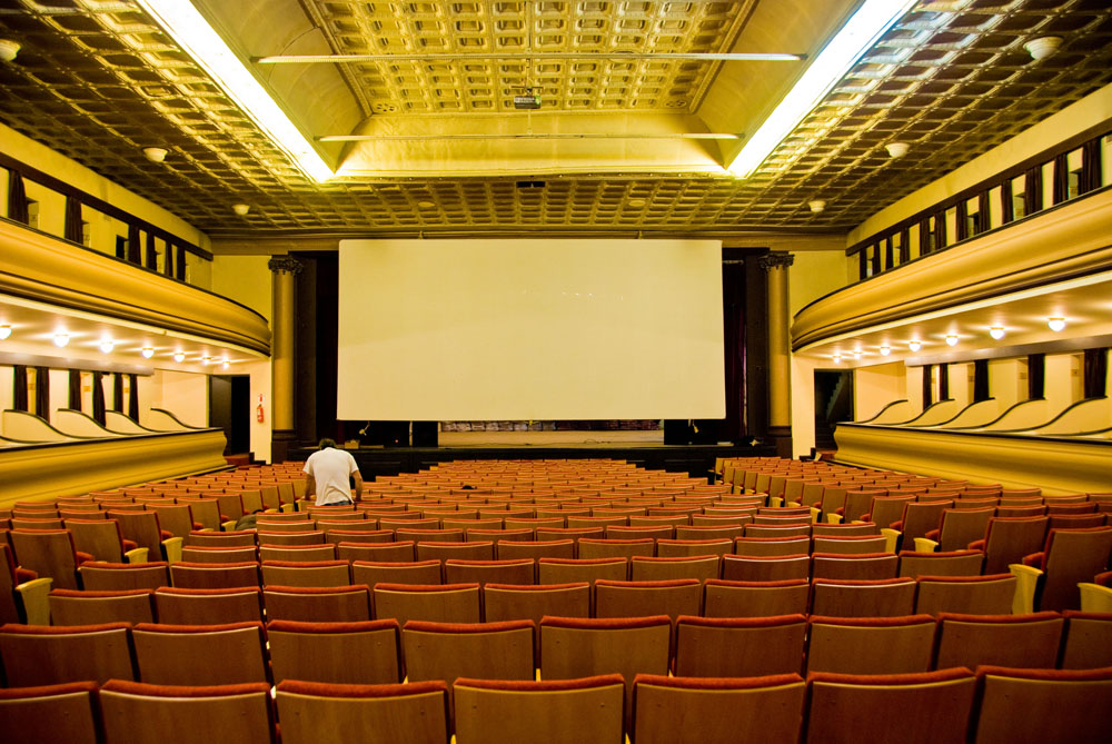 la iluminacion arquitectura y pantalla y decoracion del monumneto